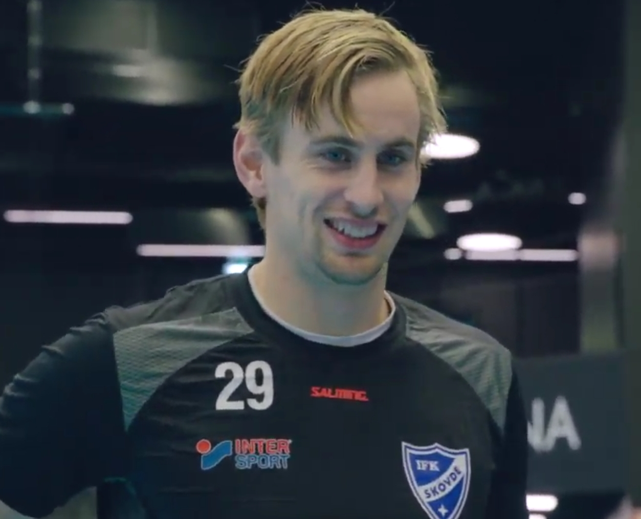 Richard Hanisch på uppvärmining innan match mot Ystad